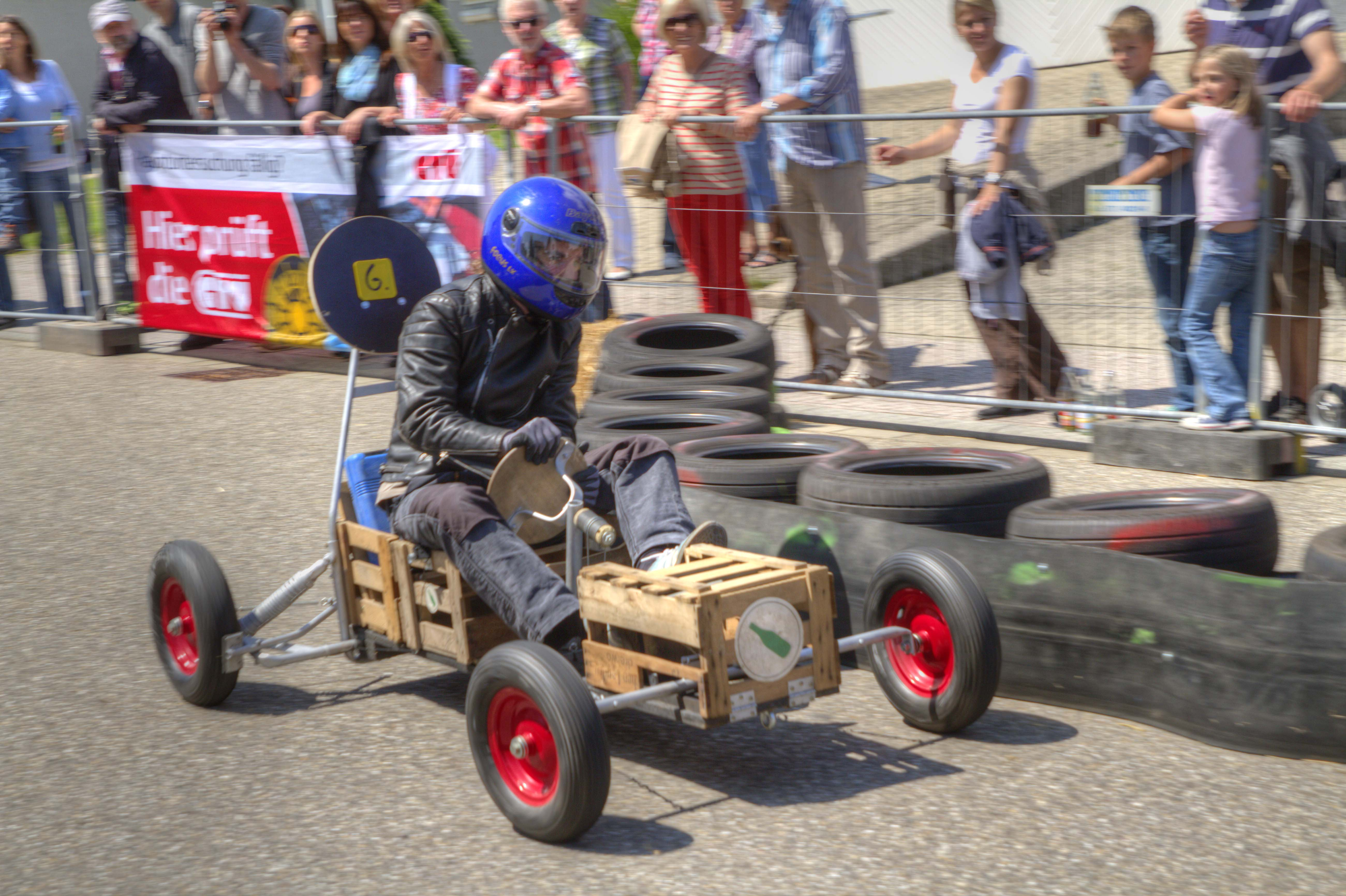 Eine Seifenkiste beim Völkersbacher Brunnenfest, einem Teilort von Malsch.